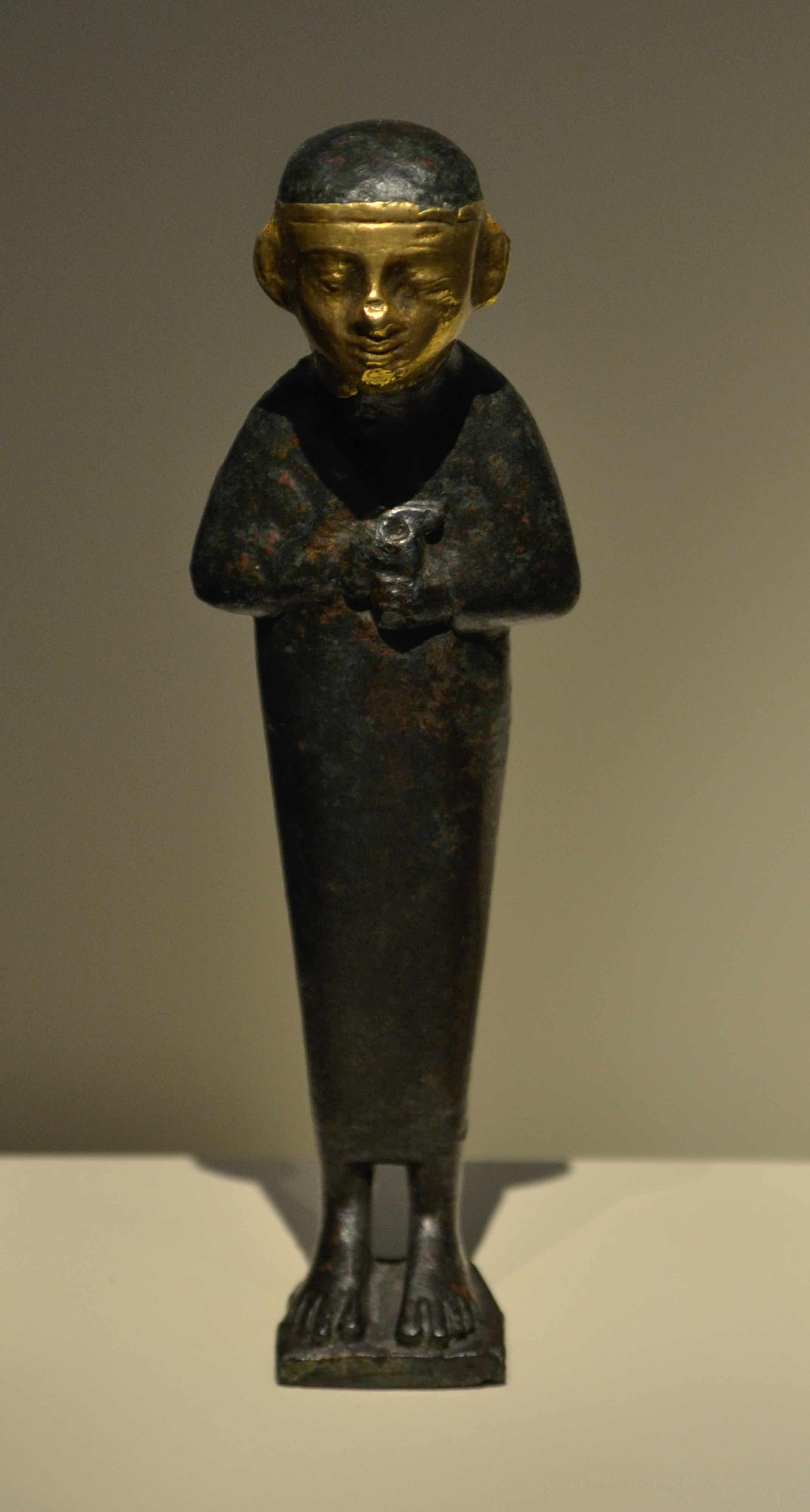 Figura humana realizada en bronce, con una máscara de oro aplicada sobre la cara que resalta sus rasgos: labios gruesos, nariz ancha y ojos almendrados. Sobre la cabeza lleva un casquete rematado por cintas. Viste túnica larga, ajustada y con mangas. Lleva los brazos doblados sobre el pecho donde sujetaría un objeto que no se ha conservado. La pieza es solidaria con una gruesa espiga en la base donde apoya los pies destinada a embutirse en otro objeto. La composición de su bronce, con arsénico y zinc, hacen pensar que se trata de una pieza importada, posiblemente de Fenicia. El hecho de que lleve máscara de oro hace suponer que el personaje representado tiene carácter divino o relacionado con la divinidad. La figura se conoce como "Sacerdote de Cádiz" por haberse hallado en Cadiz, en las obras de un solar, y haberse considerado tradicionalmente que representaba a un sacerdote del templo de Melkart en actitud orante. materila. oro y bronce batido. Siglo VII a. C. Altura: 12,90 cm; grosor máximo: 1,80 cm; anchura máxima: 3,90 cm; altura máxima: 14,50 cm. Nº inv. 31920. Museo Arqueológico Nacional de España.